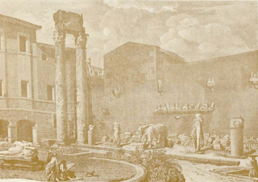 Vestiges visibles du théâtre antique d'Arles au début du XIX° siècle, avant le dégagement du théâtre. La cour dite de la Miséricorde était devenu un véritable musée à ciel ouvert